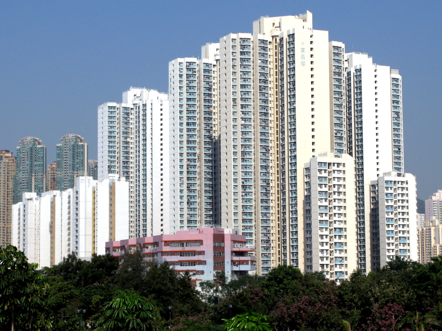 Fu Cheung Estate 富昌邨